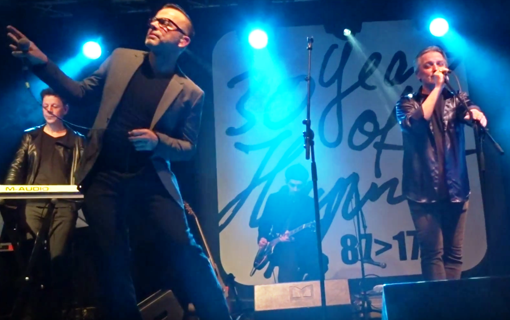 Die deutschen Sänger Peter Heppner und Marcus Meyn während Heppners "30 Years of Heppner Tour" im Gewerkschaftshaus Erfurt/Deutschland am 24. November 2017.